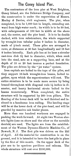 The Coney Island Pier. Manufacturer and builder / Volume 11, Issue 6, June 1879. Zeitungsartikel über den Eisernen Pier auf Coney Island.